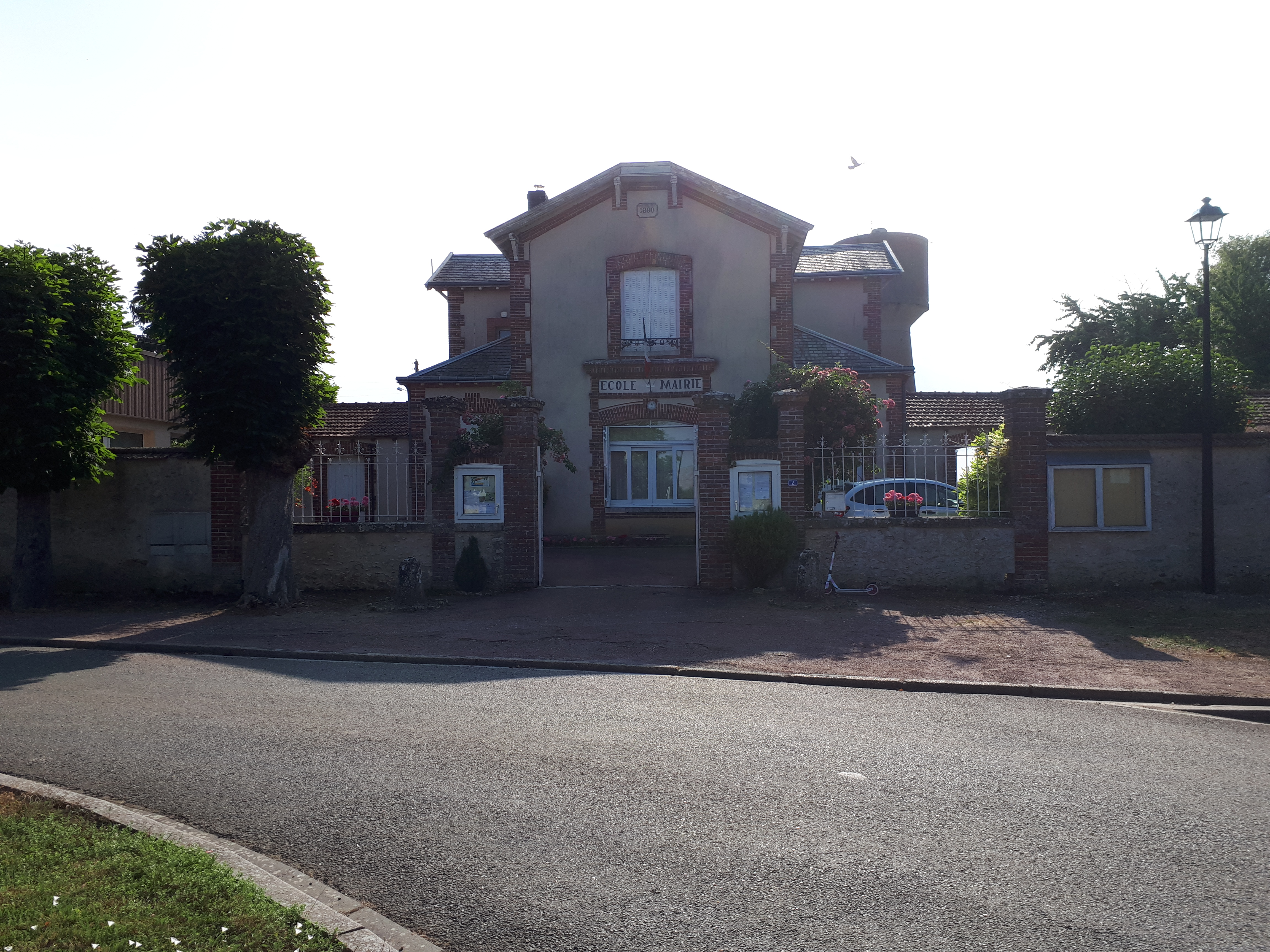 Mairie de Saint-Léger-des-Aubées (28)